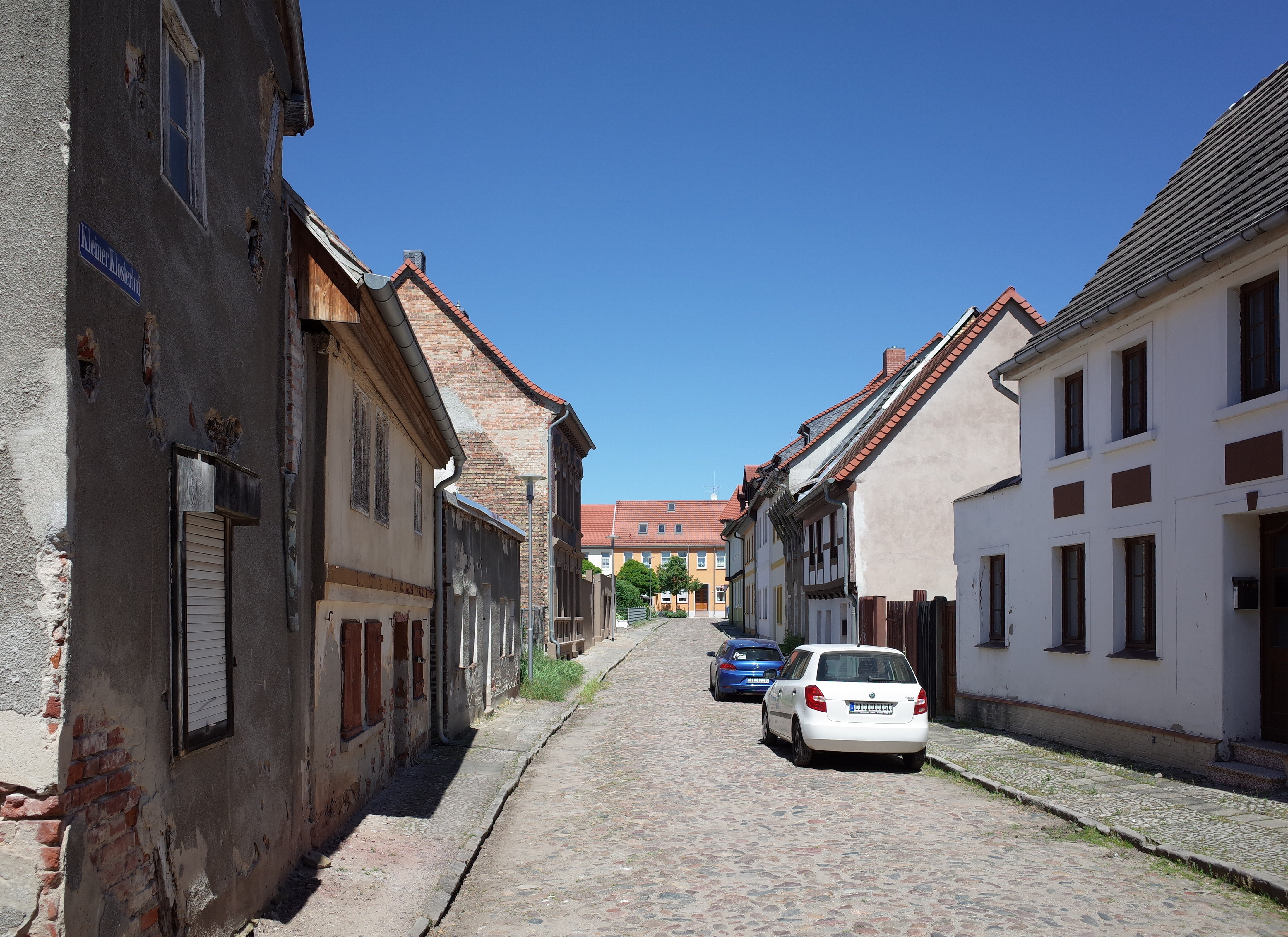 Zerbst/Anhalt, Kleiner Klosterhof.